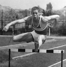 Guy Drut in 1969.